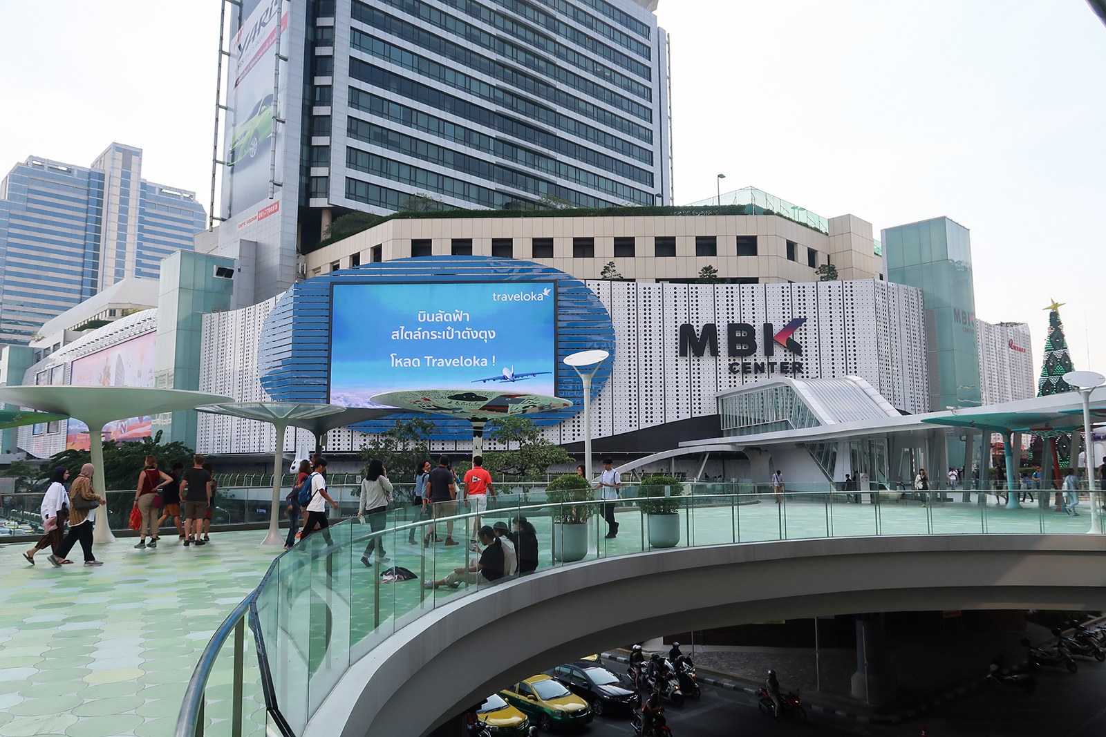 MBK Center